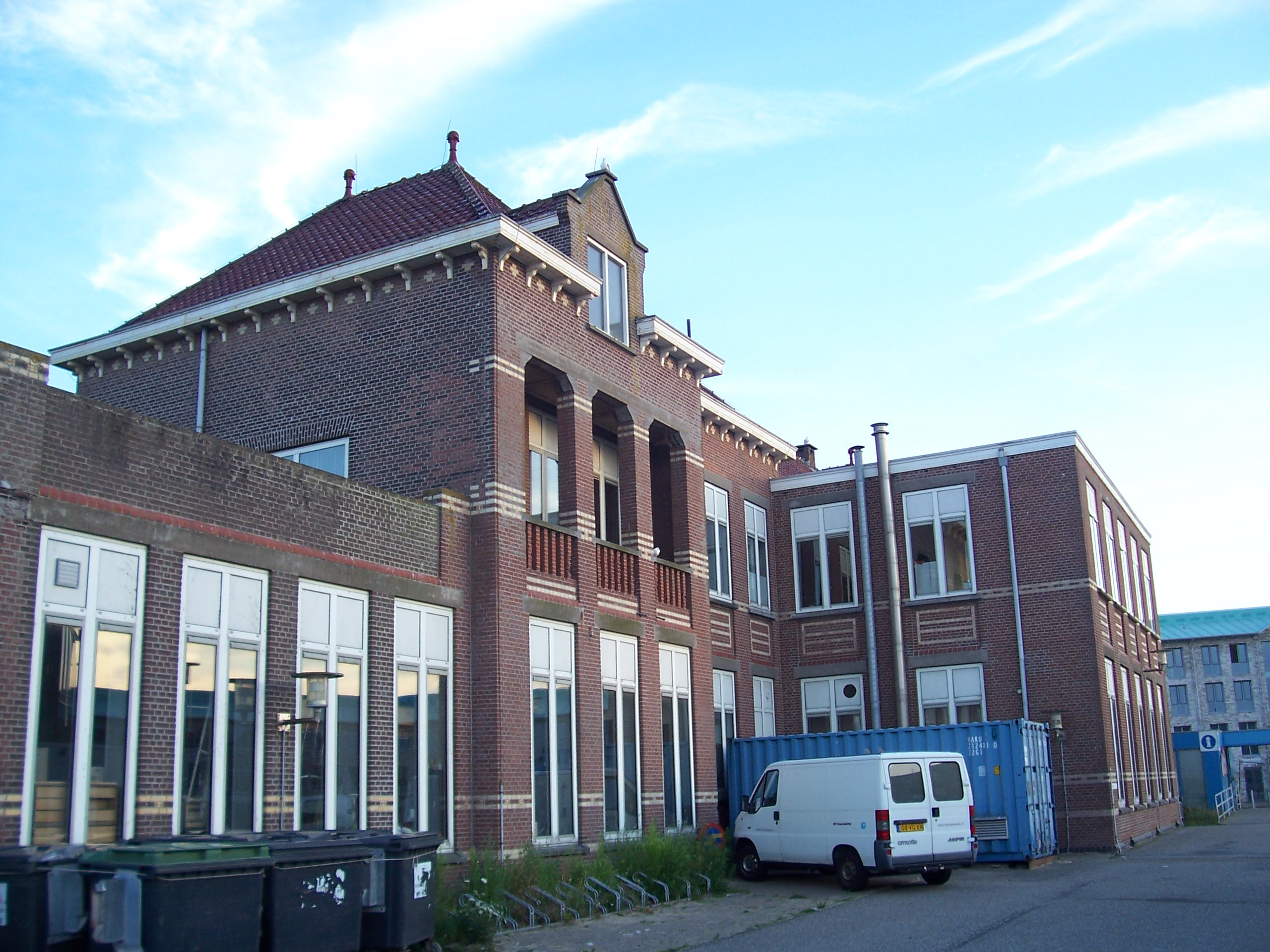 Rijnlands Zeehospitium, laatste restant oude gebouw